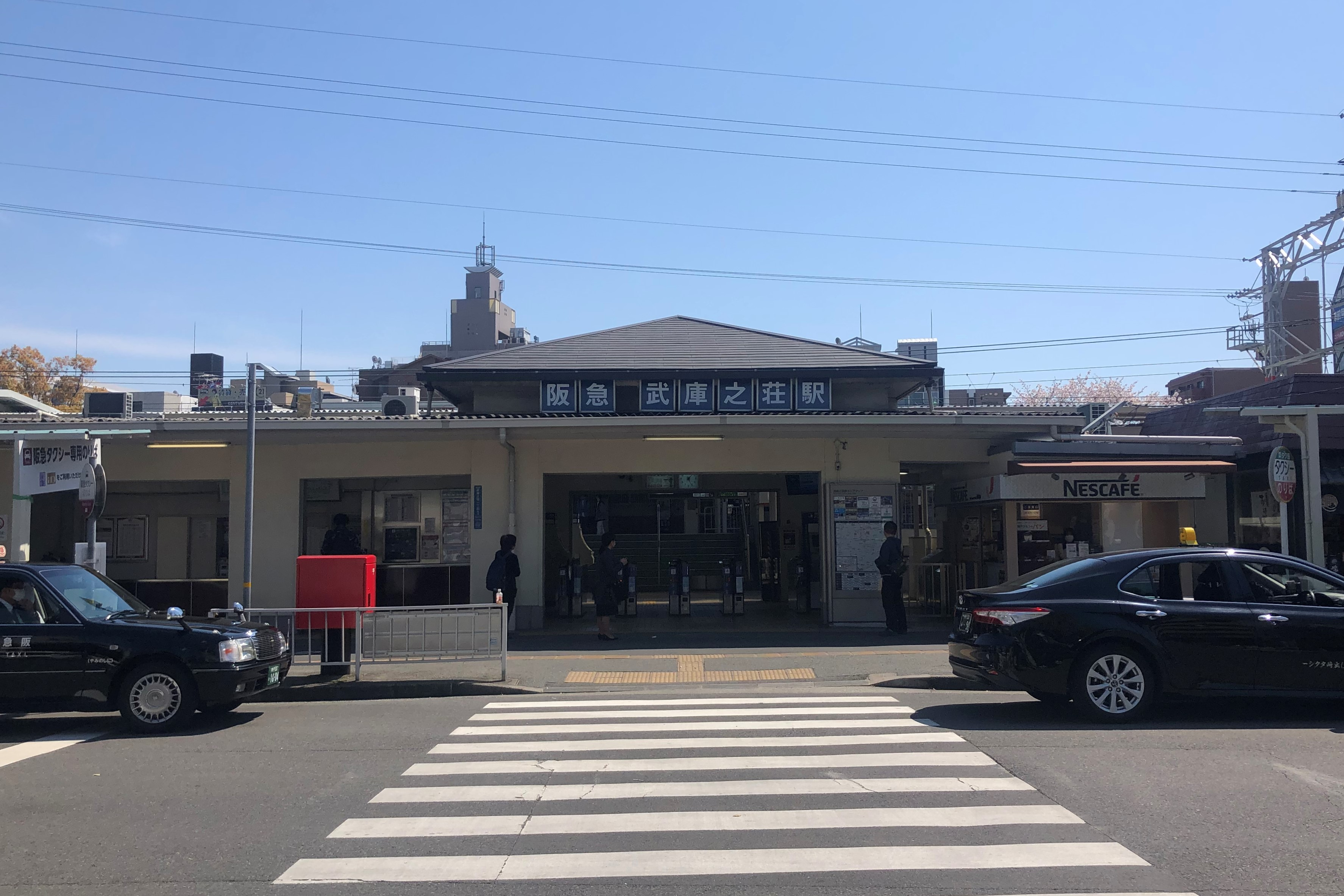 阪急電鉄武庫之荘駅北口